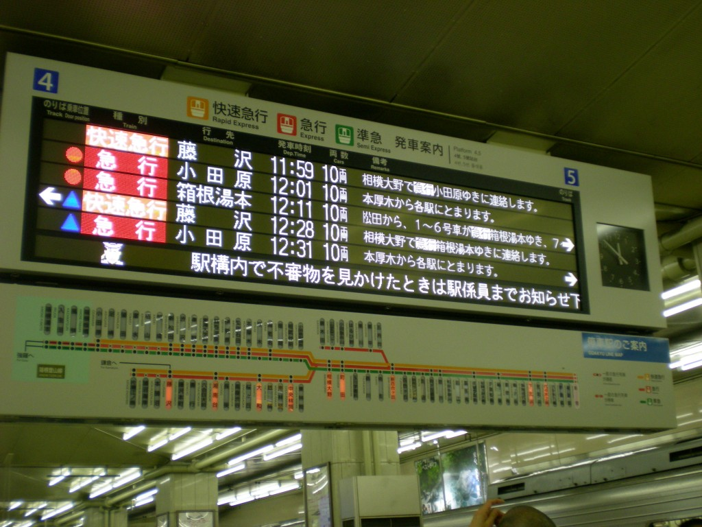 Odakyu Shinjuku Station Information Board